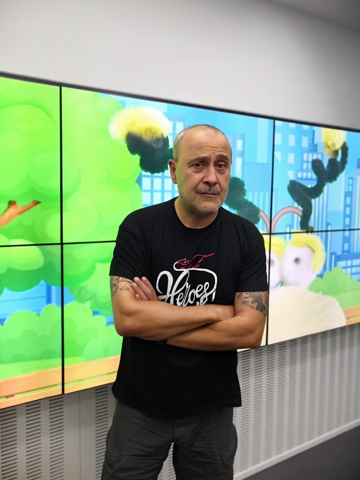 Carlos Rodríguez, presentador de Como el perro y el gato, en Onda Cero, tras un programa en el estudio 2.